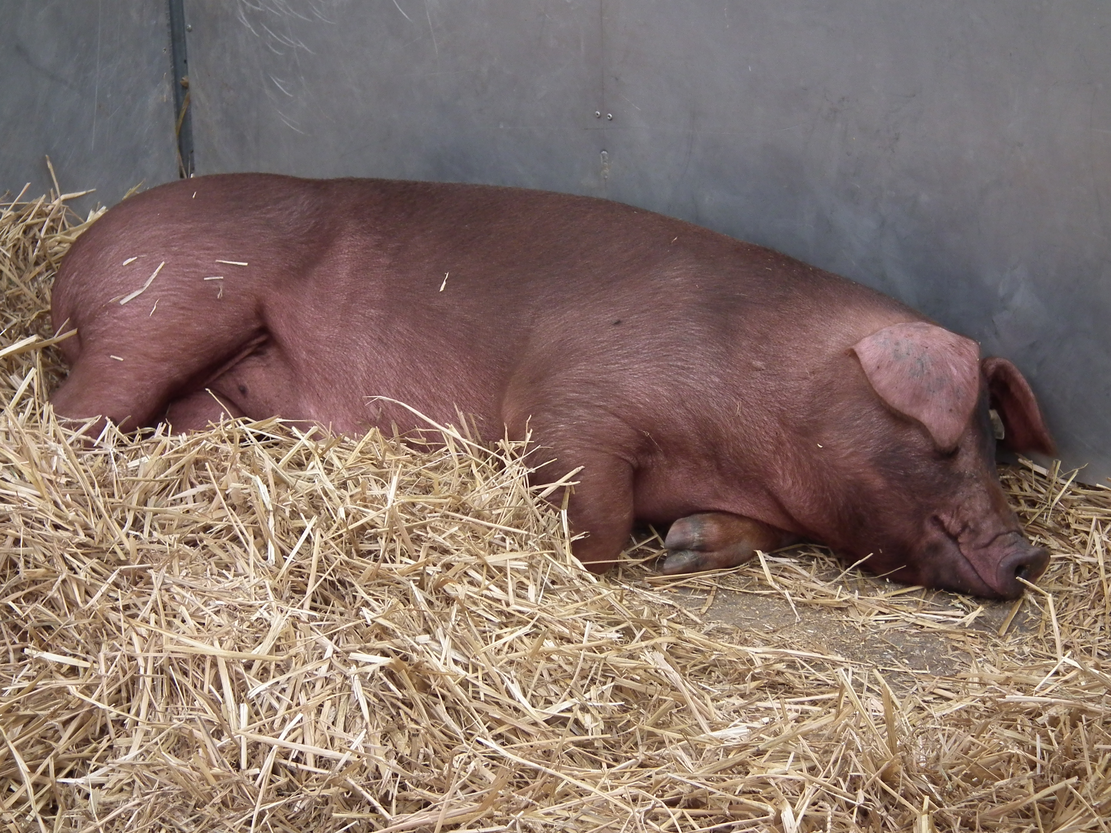 Schlafende junge Duroc-Sau